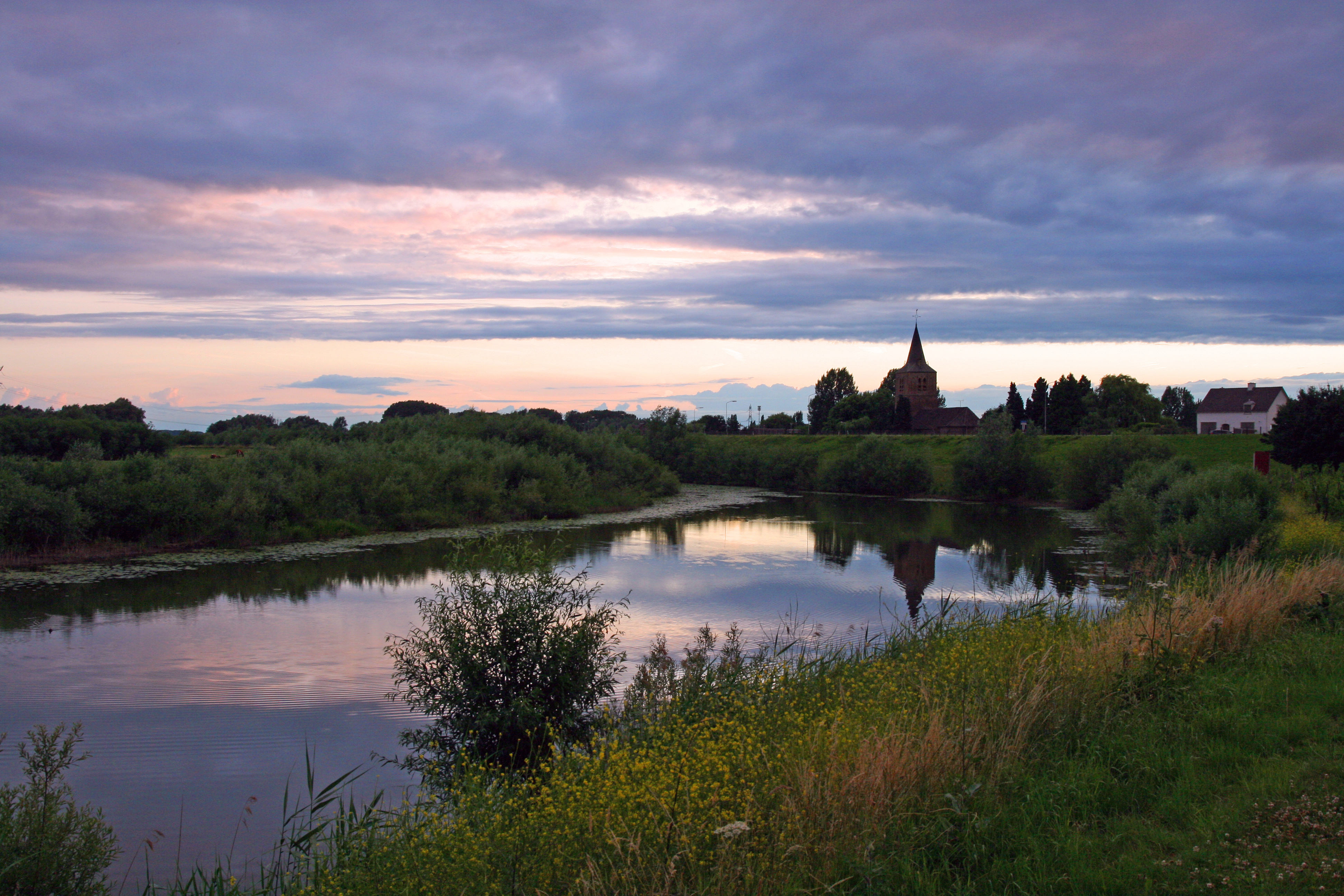 Sunset